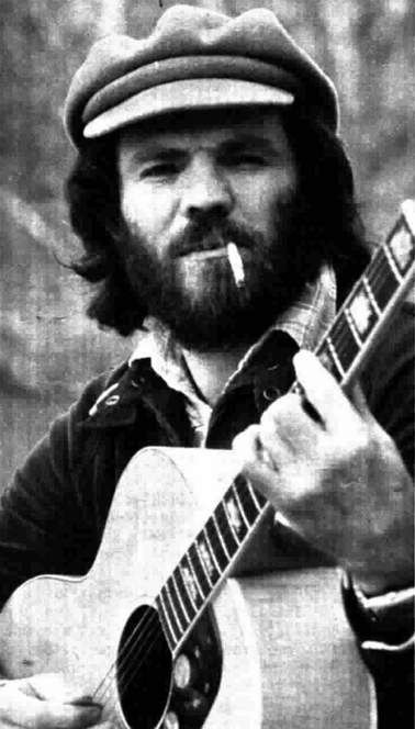 Italian singer Santino Rocchetti